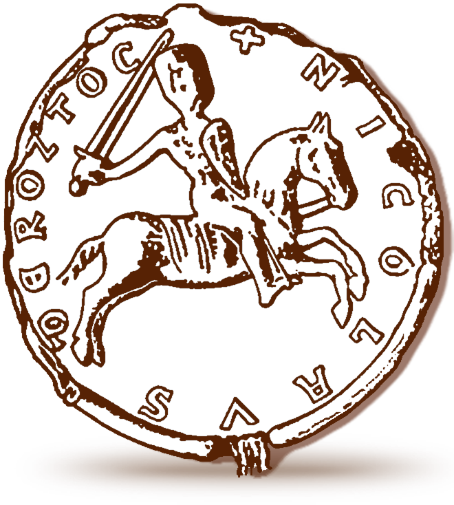 Печать Ростокского князя Николая, соправителя бодричей. 1189 г.